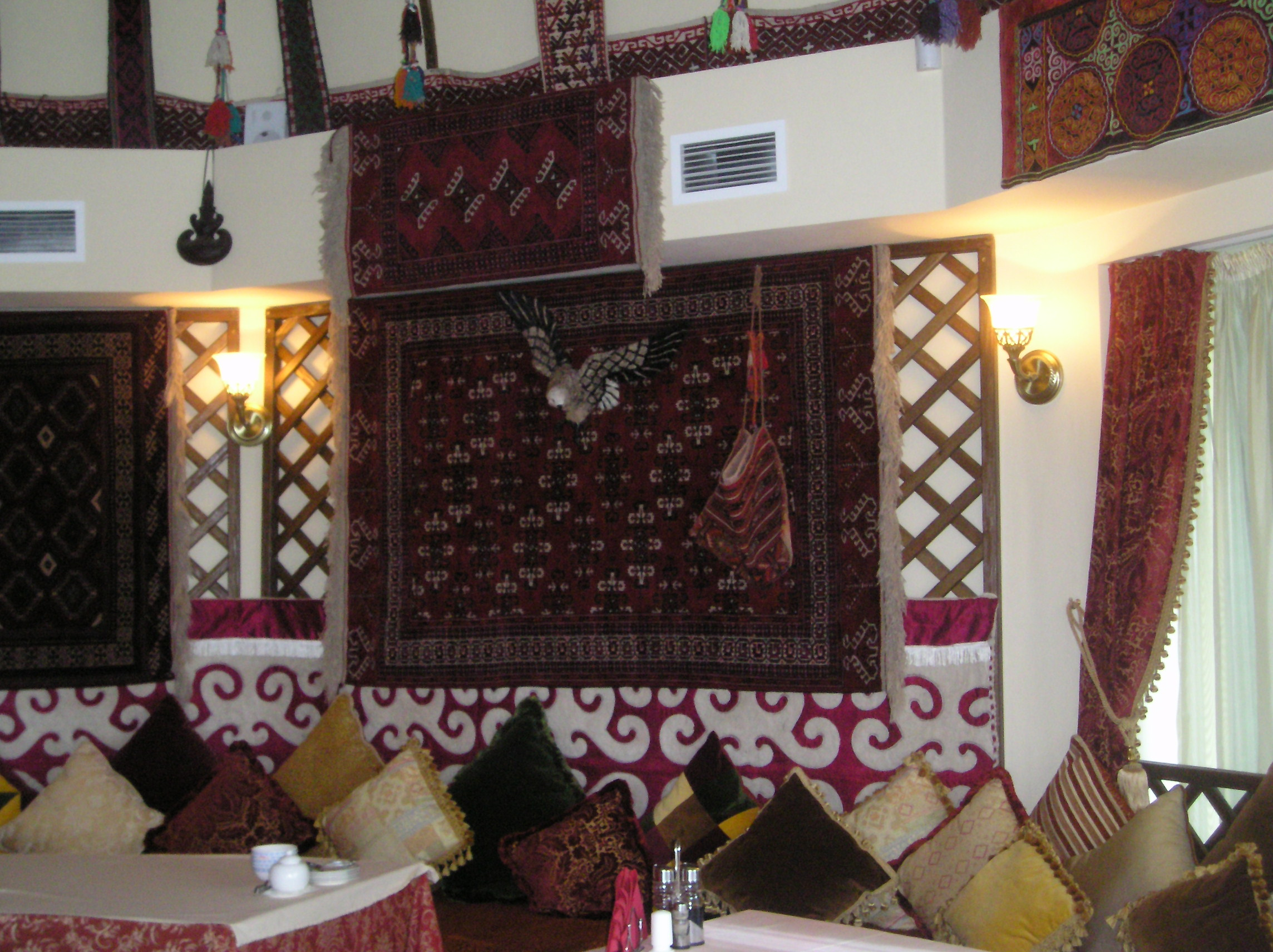 Казахская Юрта, жилище кочевых казахов прошлых лет